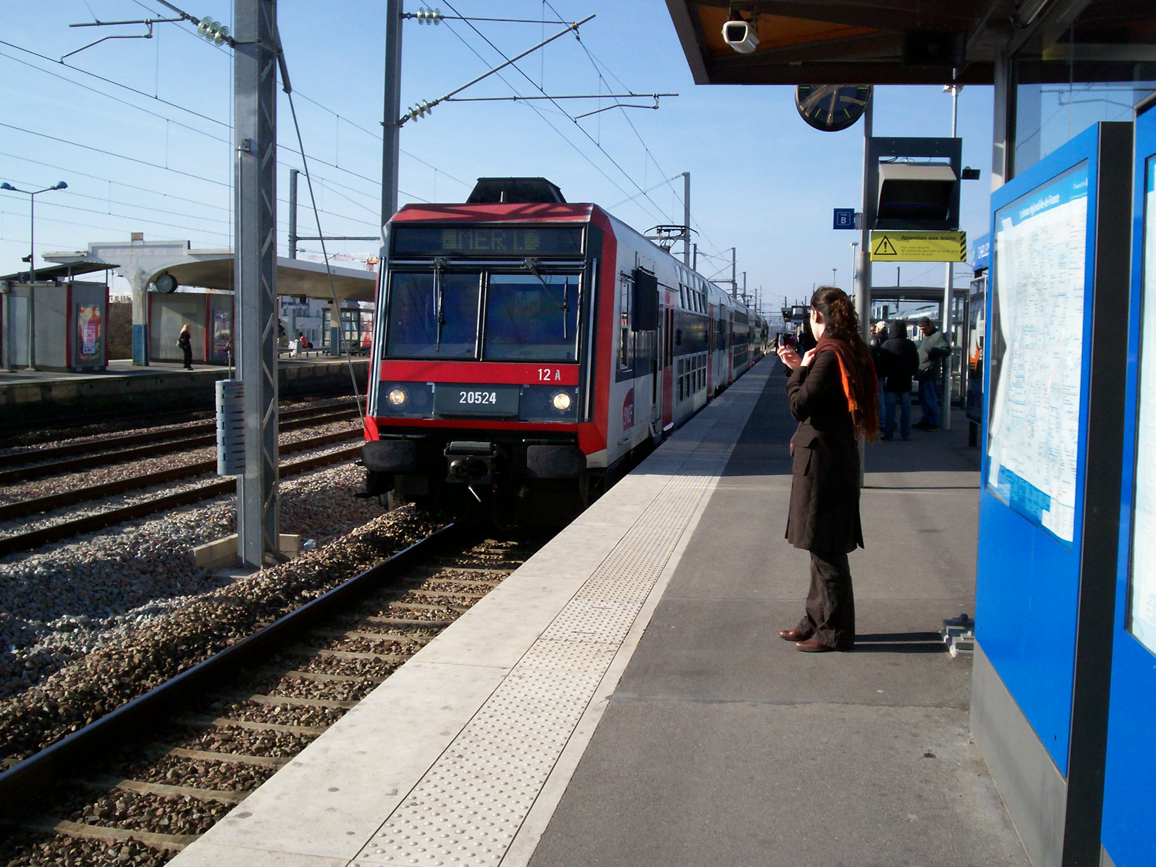 Rame Z 20500 arrivant en gare de Chelles et en direction de Meaux